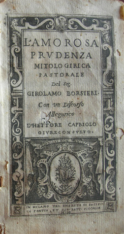 Pagina intoduttiva della favola pastorale l'amorosa prudenza di Girolamo Borsieri.